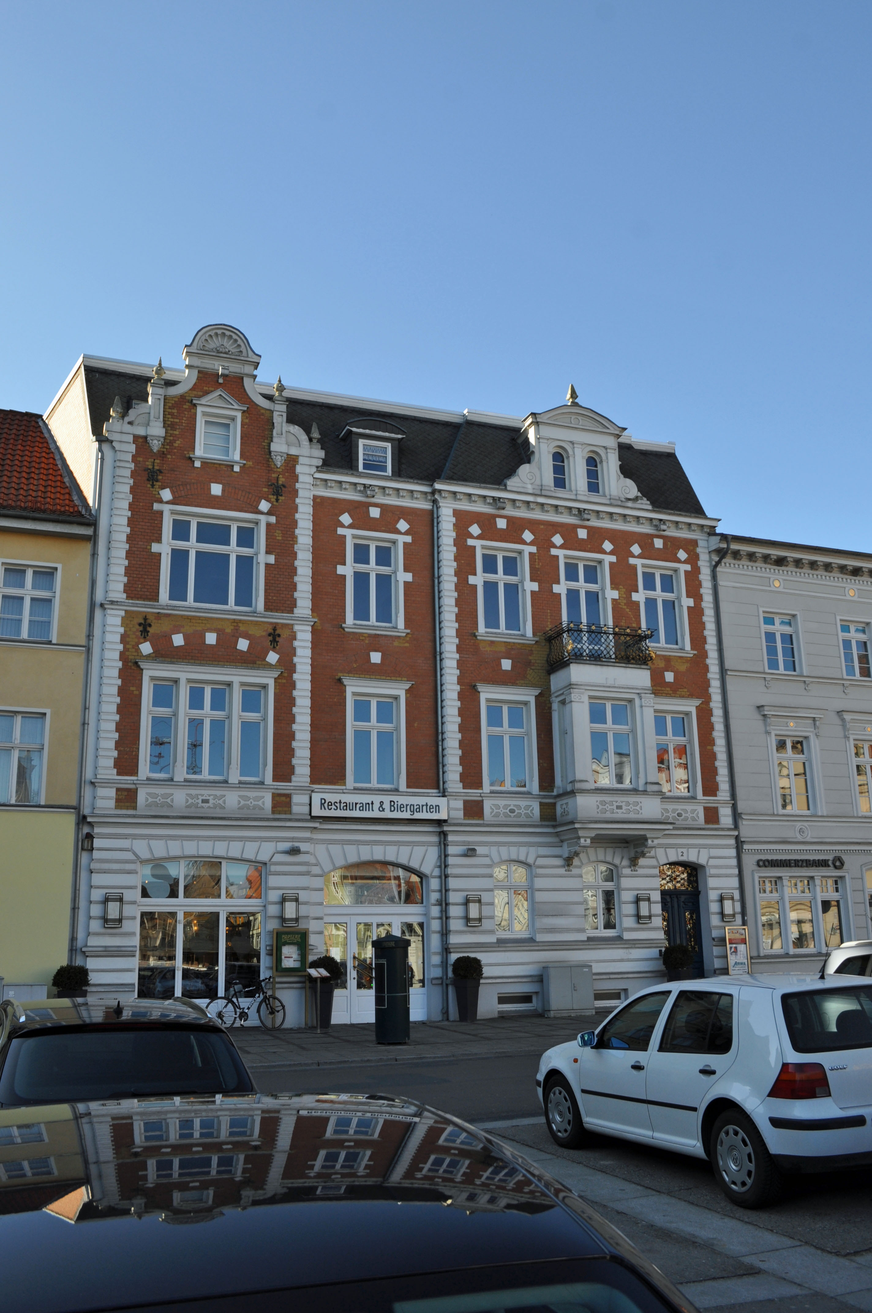 Gebäude bzw. Gebäudedetail in Stralsund. Straße und Hausnummer siehe Dateiname.